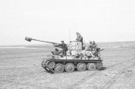 Krim, Anfang Mai 1942 Aufmarsch zum Angriff auf die Halbinsel Kertsch